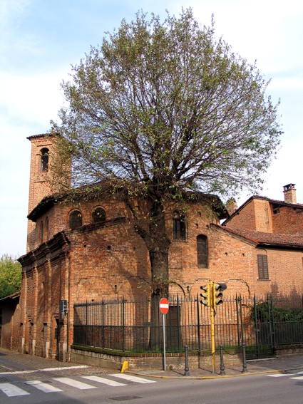 Chiesa di San Rocco a San Colombano al Lambro (MI)